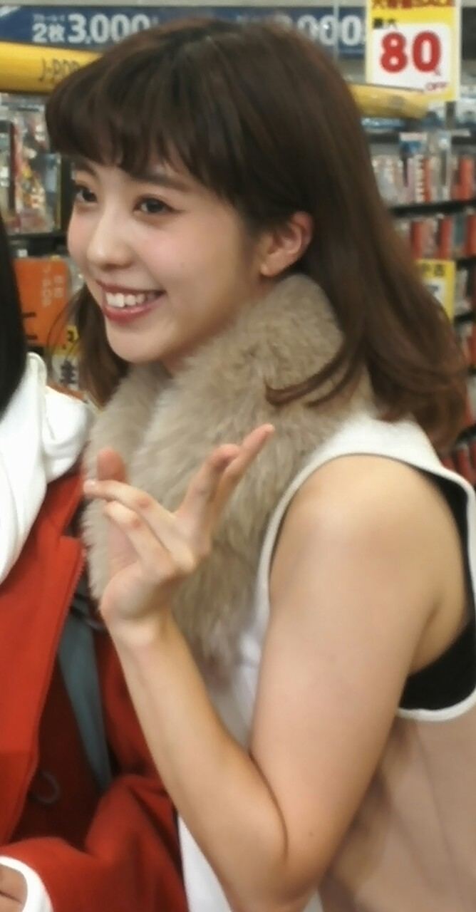 小玉ゆうい（Yuui Kodama）